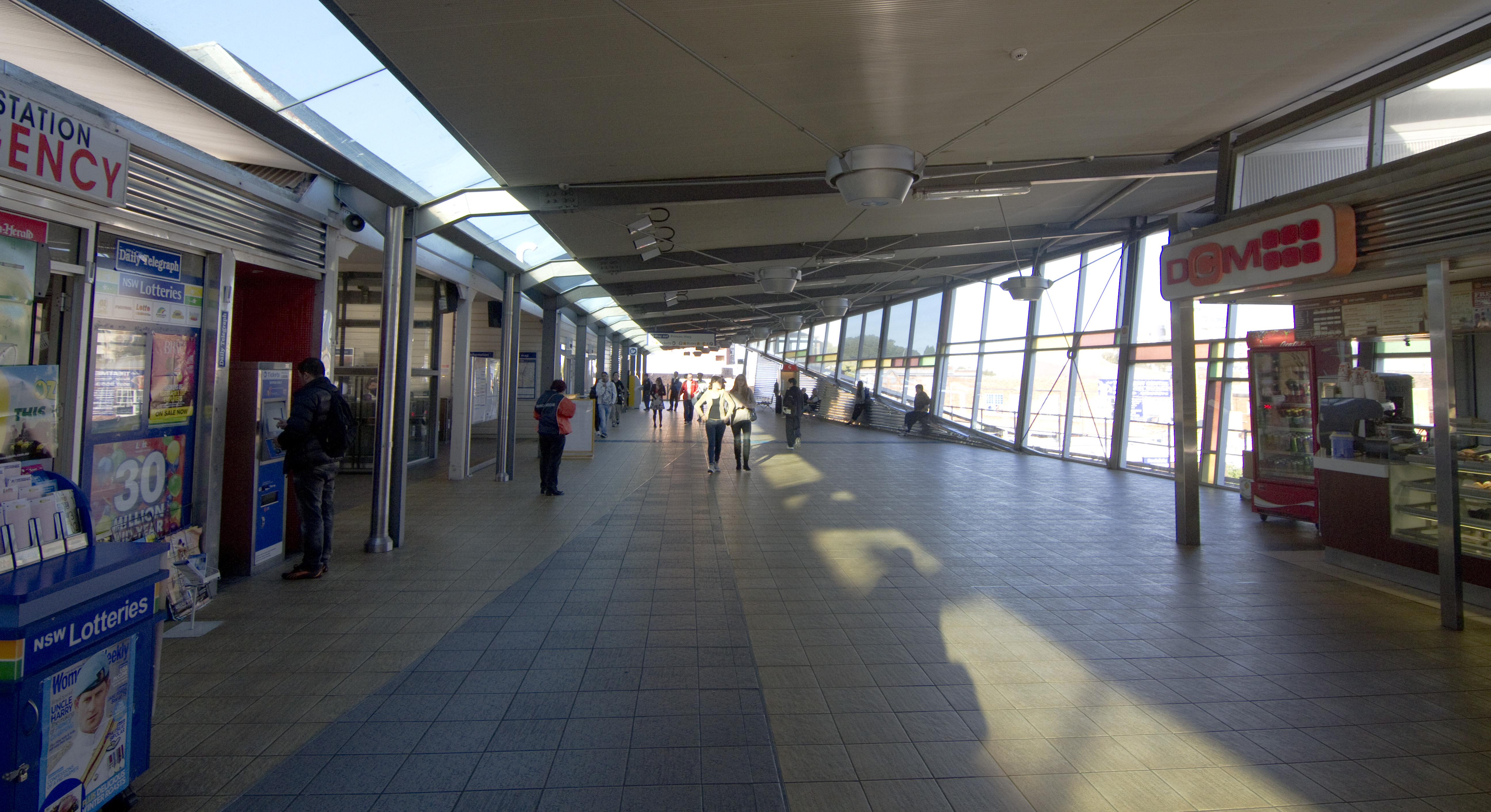 Rockdale NSW 2216, Australia